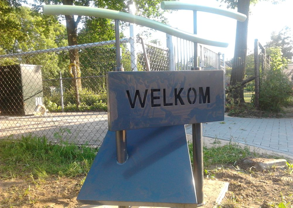 Kunstwerk op grens bebouwde kom "De Belt" (gemeente Hardenberg)